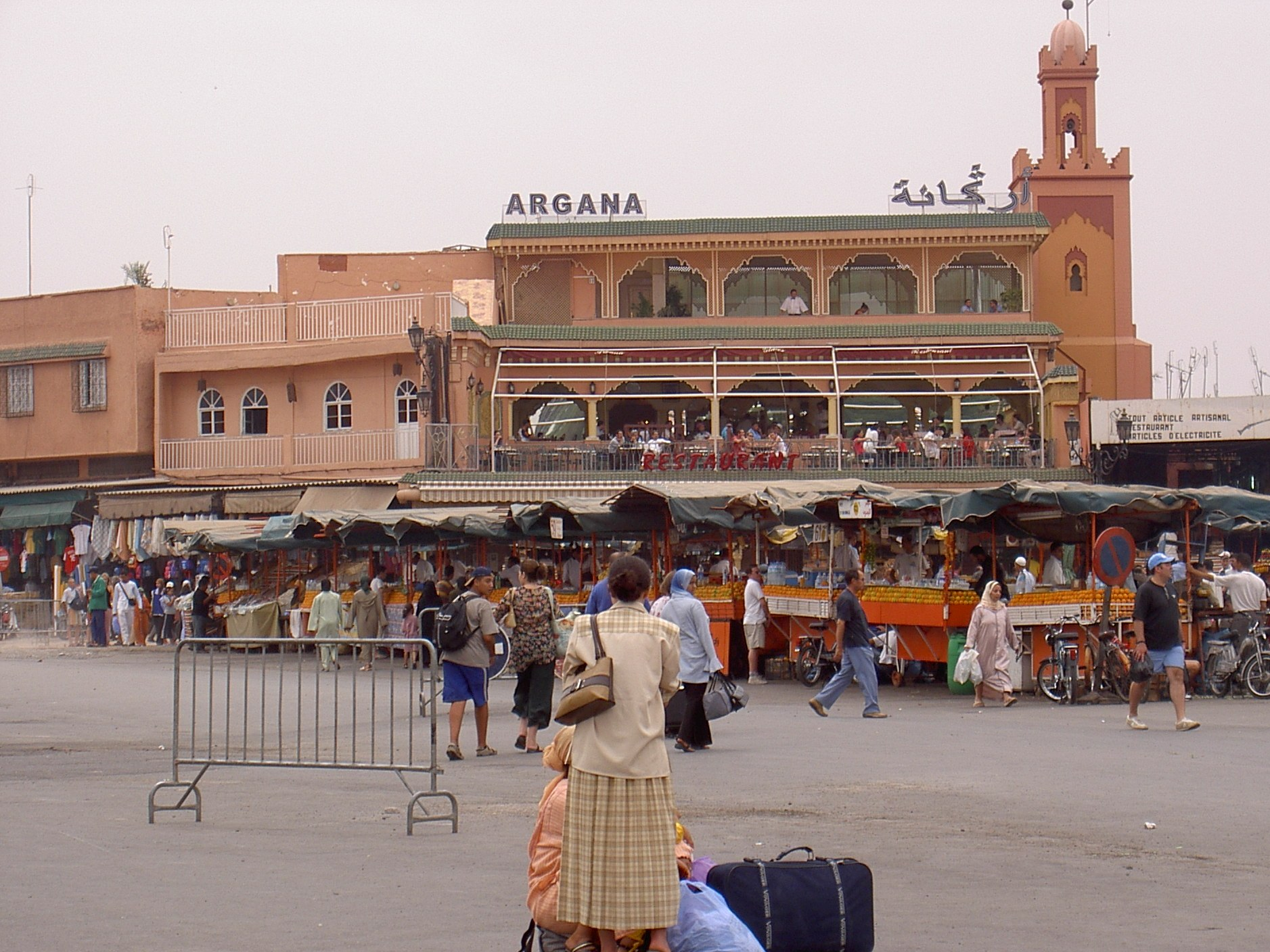 Le restaurant Argana, sur la place Jamaâ El Fna de Marrakech en 2004